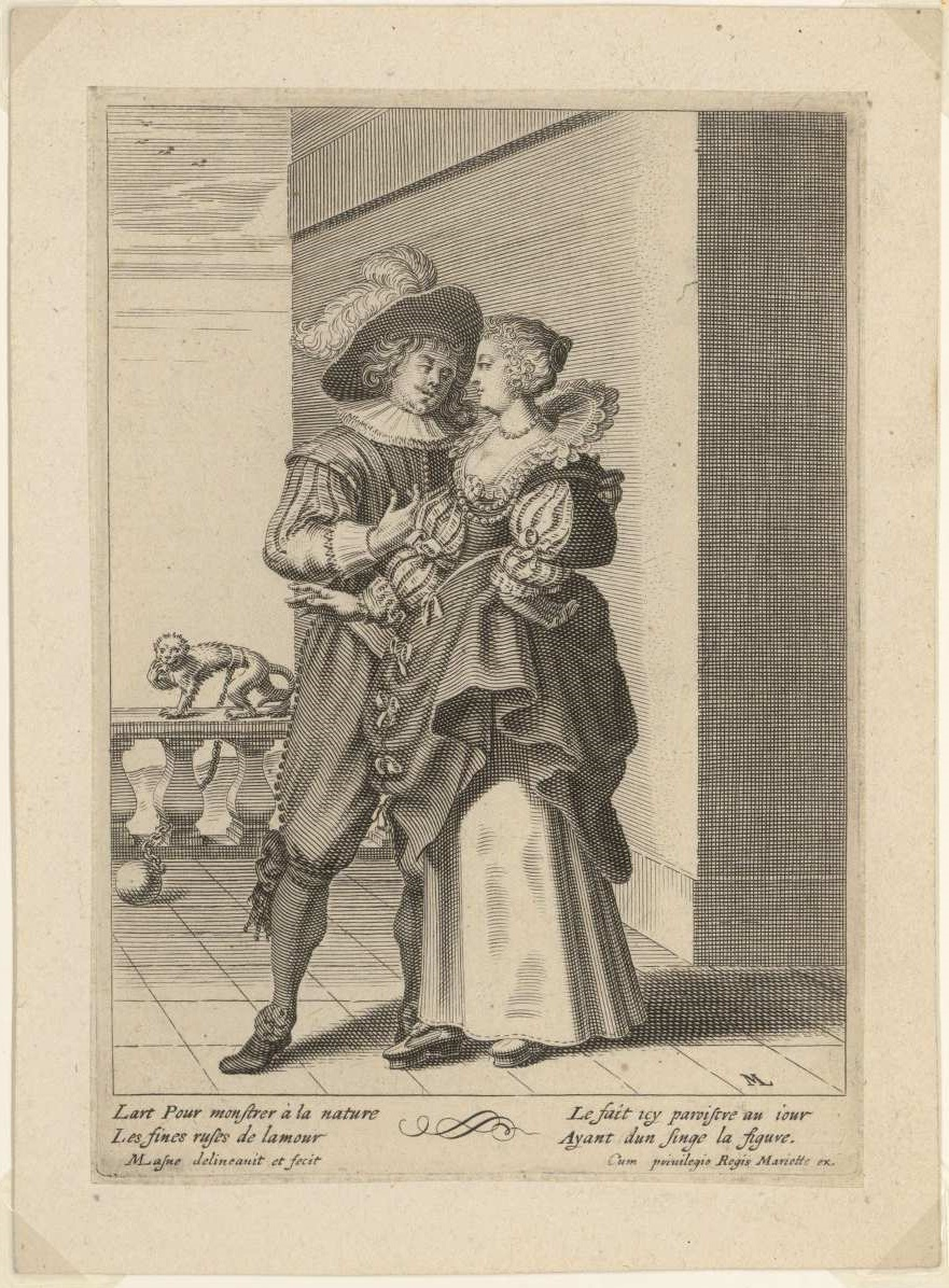 Un caballero con una dama; estampa a buril con el monograma ML enlazadas y la firma M Lasen delineavit et fecit. Biblioteca Nacional de España